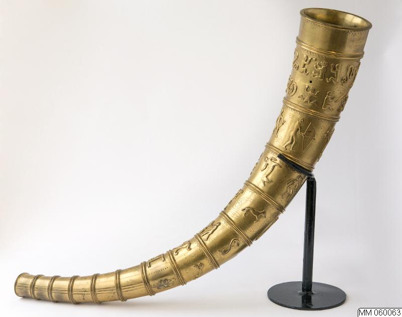 S.A. Andersen rekonstruktions af guldhornene fra 1949 findes i dag på Malmøhus Slot (Malmö Museerne). Den oprindelige rekonstruktion fa 1944 er i Kongehusets eje og findes på Gråsten Slot.